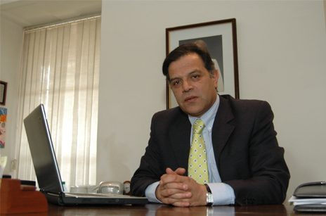 Carlos Sottolichio Urquiza